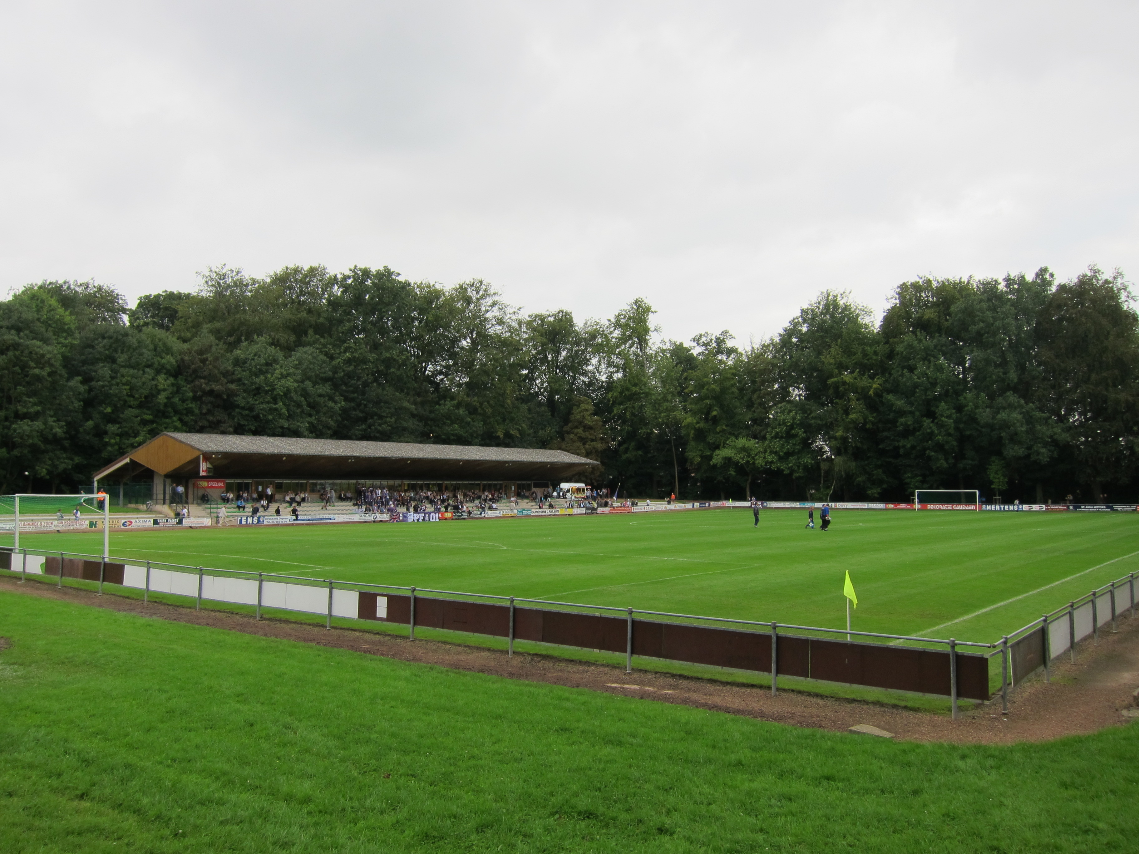 Het Prinsenbosstadion van KSC Grimbergen, België